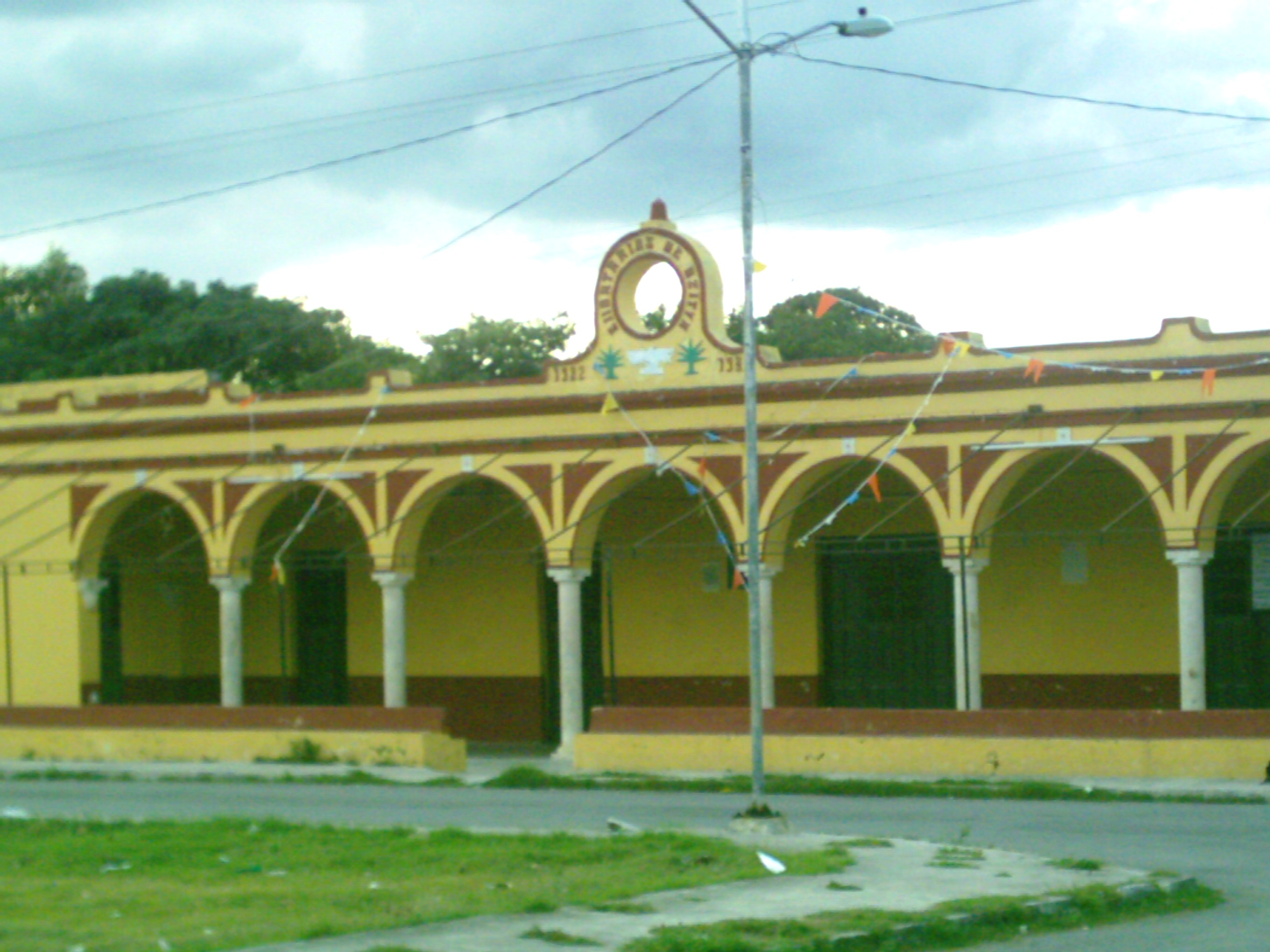 Casa comisarial de Dzityá, Yucatán.